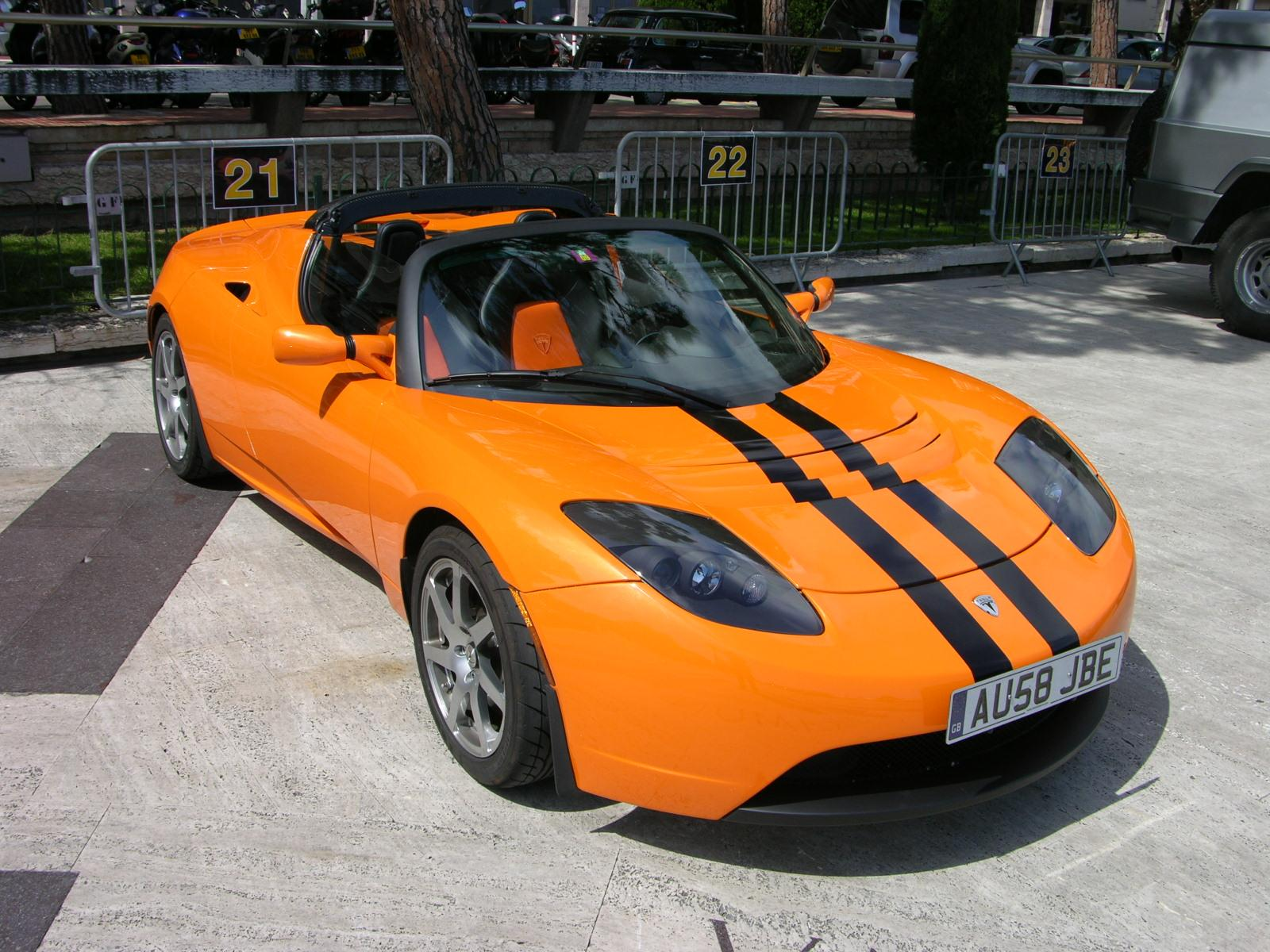 Tesla Roadster